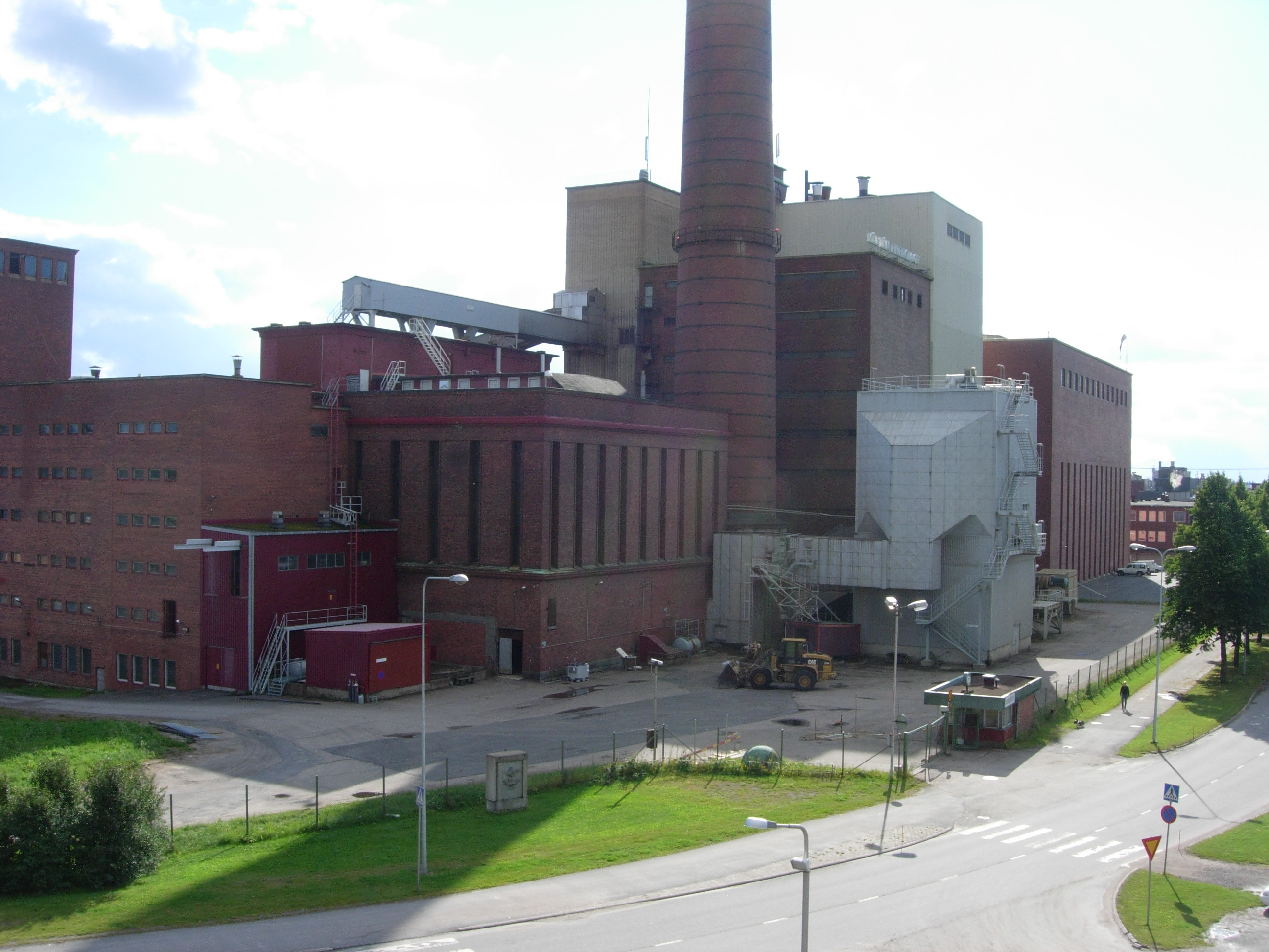 Metsä Tissuen tehdas Mäntässä.